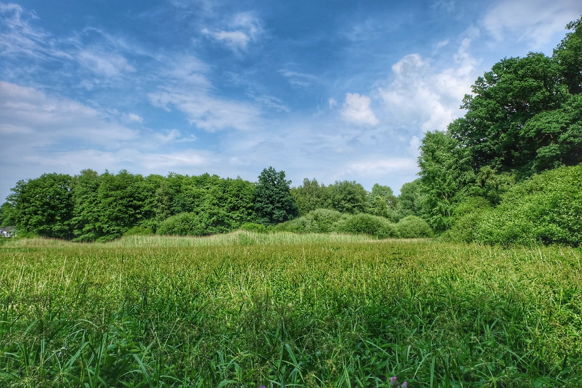 Naturschutzgebiet Duvenwischen, südlicher Bereich "Barkholz